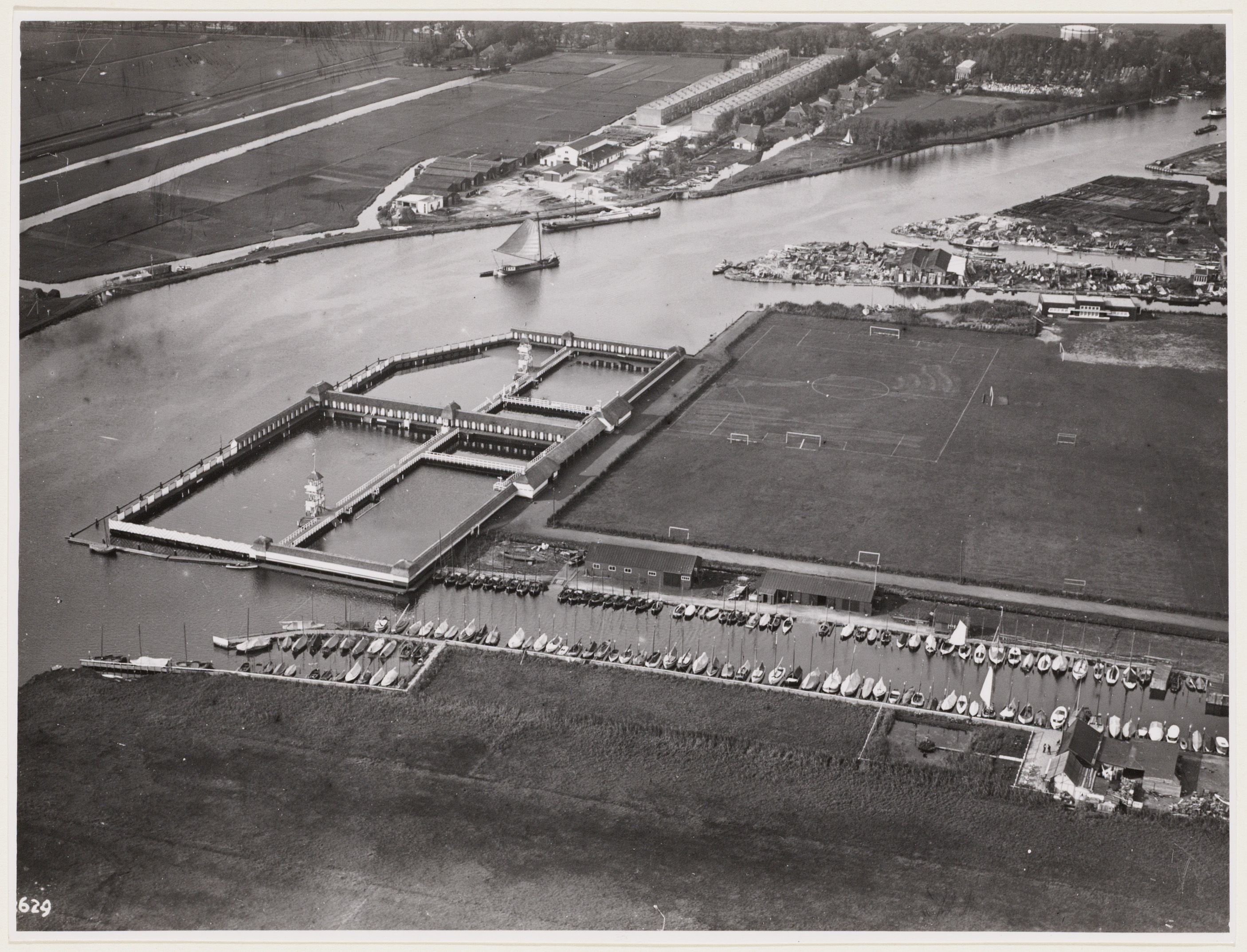 Beschrijving: Luchtfoto van de Schinkel gezien in noordwestelijke richting. Bovenaan de Sloterweg. Midden zwembad De Schinkel, (Schinkelbad) en de Jachthaven. Documenttype: foto Collectie: Collectie Stadsarchief Amsterdam: foto-afdrukken Datering: 1926 Geografische naam: Sloterweg Schinkel Inventarissen: Afbeeldingsbestand: A04139001195